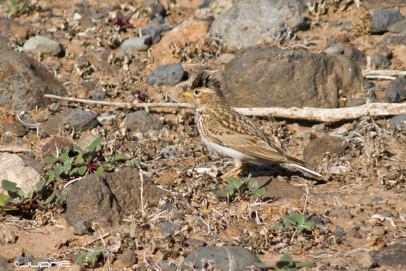 AF Nikkor 300mm f/4 IF-ED + TCx1.7